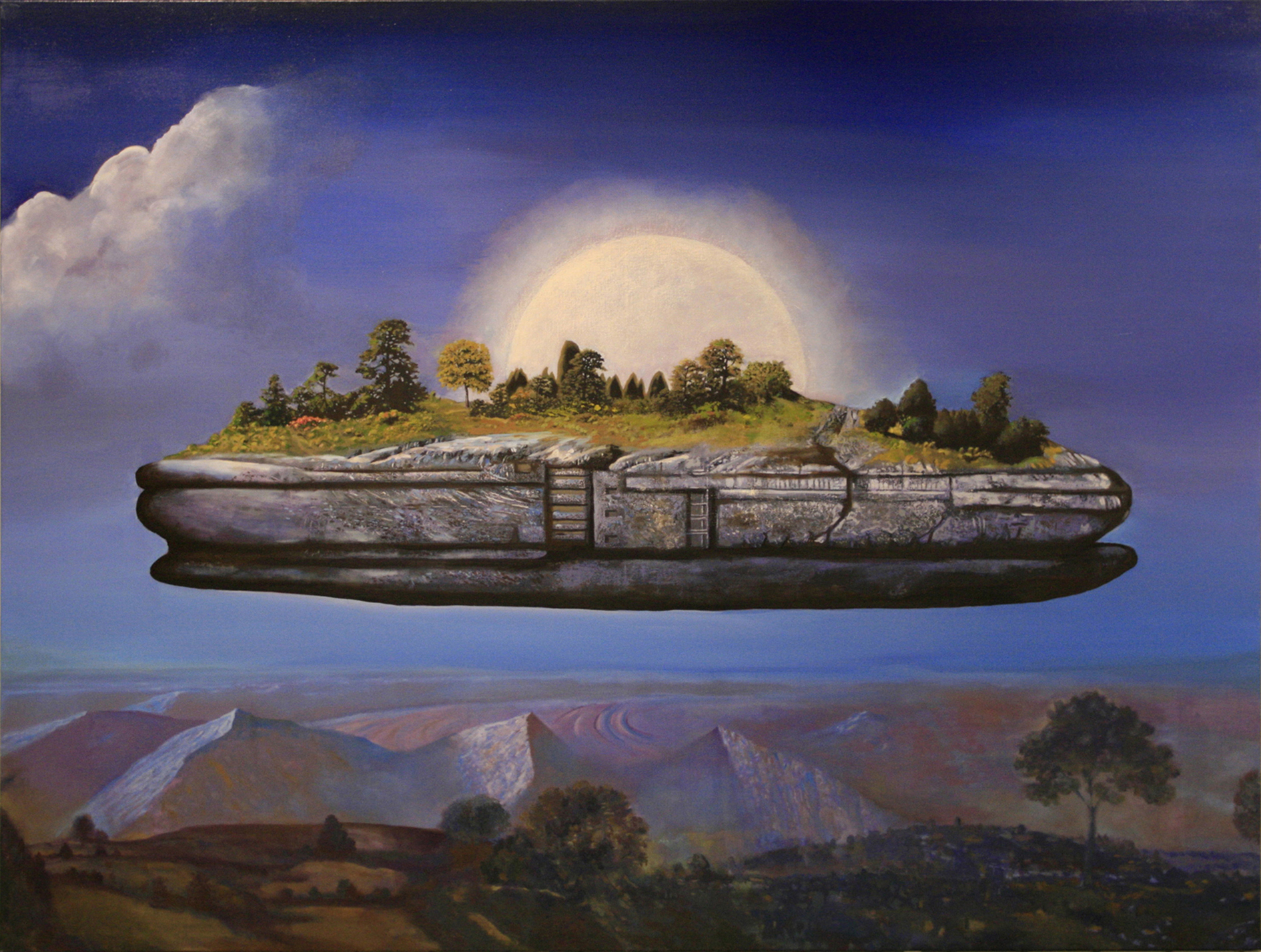 Utopien 04